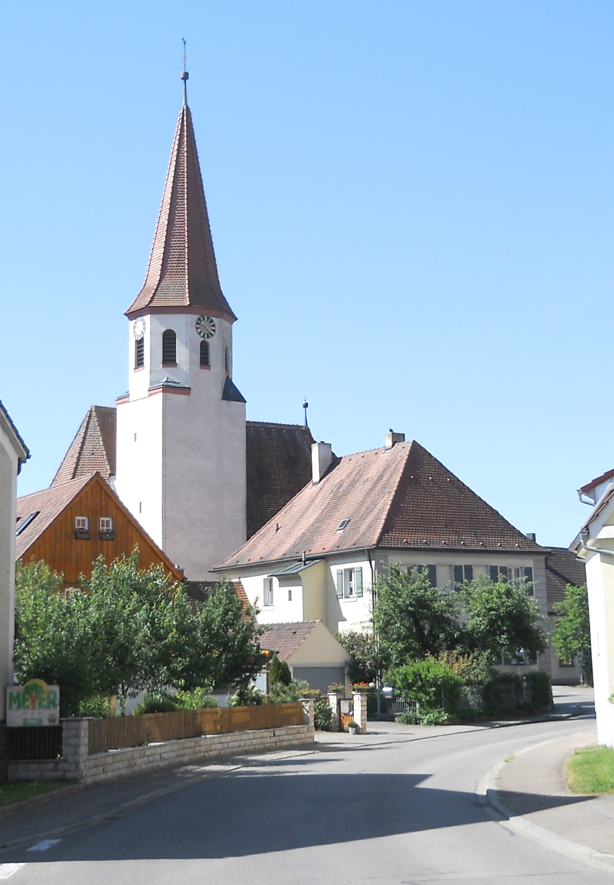 Laubenzedel, Ortsteil von Gunzenhausen im Landkreis Weißenburg-Gunzenhausen (Bayern), Evang.-lutherische PfarrKirche St. Sixtus